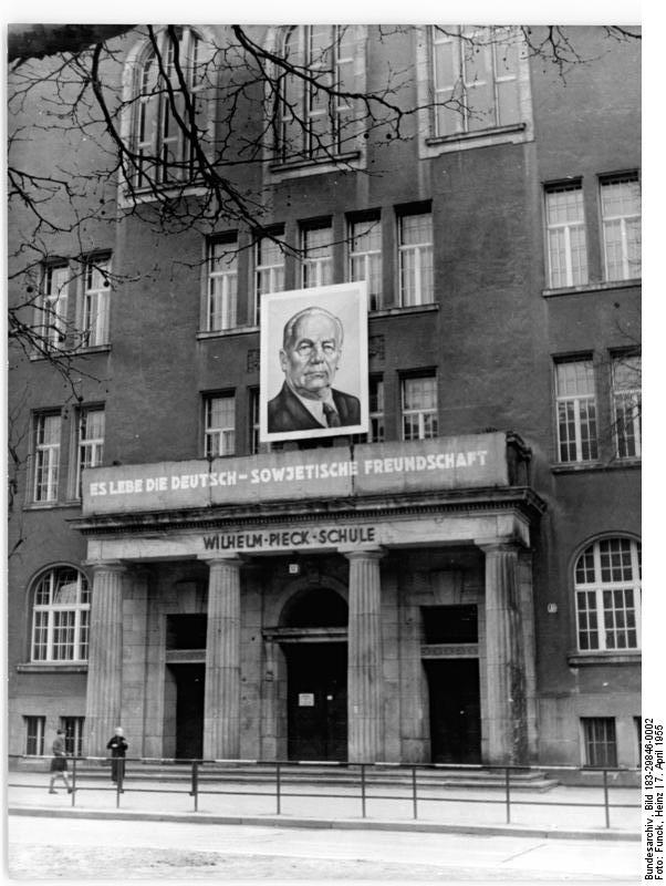 Berlin, Pankow, "Wilhelm-Pieck-Schule", Eingang Zentralbild Funck Hein-Schä 7.4.1955 Der Eingang der "Wilhelm-Pieck-Schule" in Berlin-Pankow.